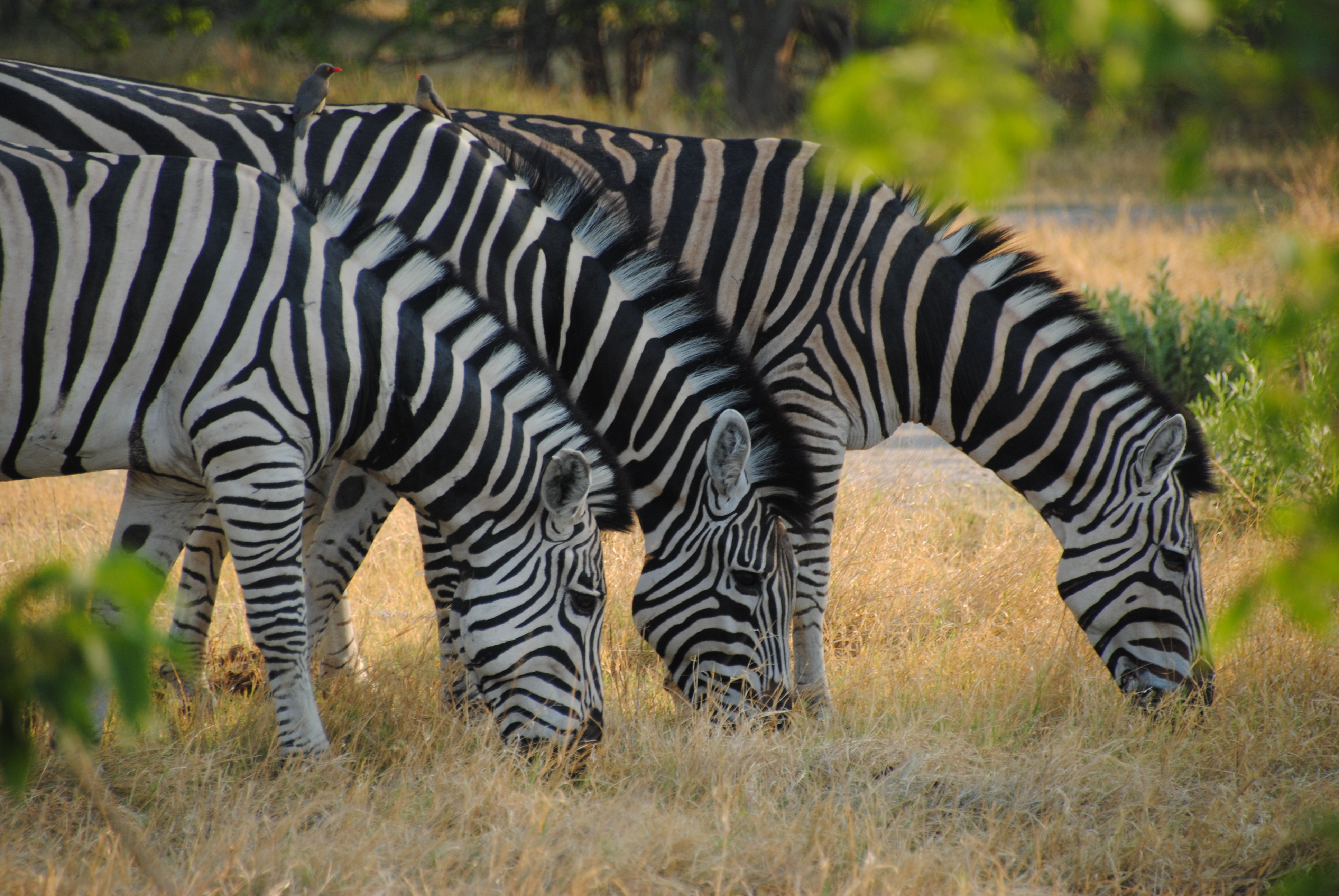 草を食むサバンナシマウマ。ボツワナ北部のモレミ野生動物保護区にて。2011年11月撮影。